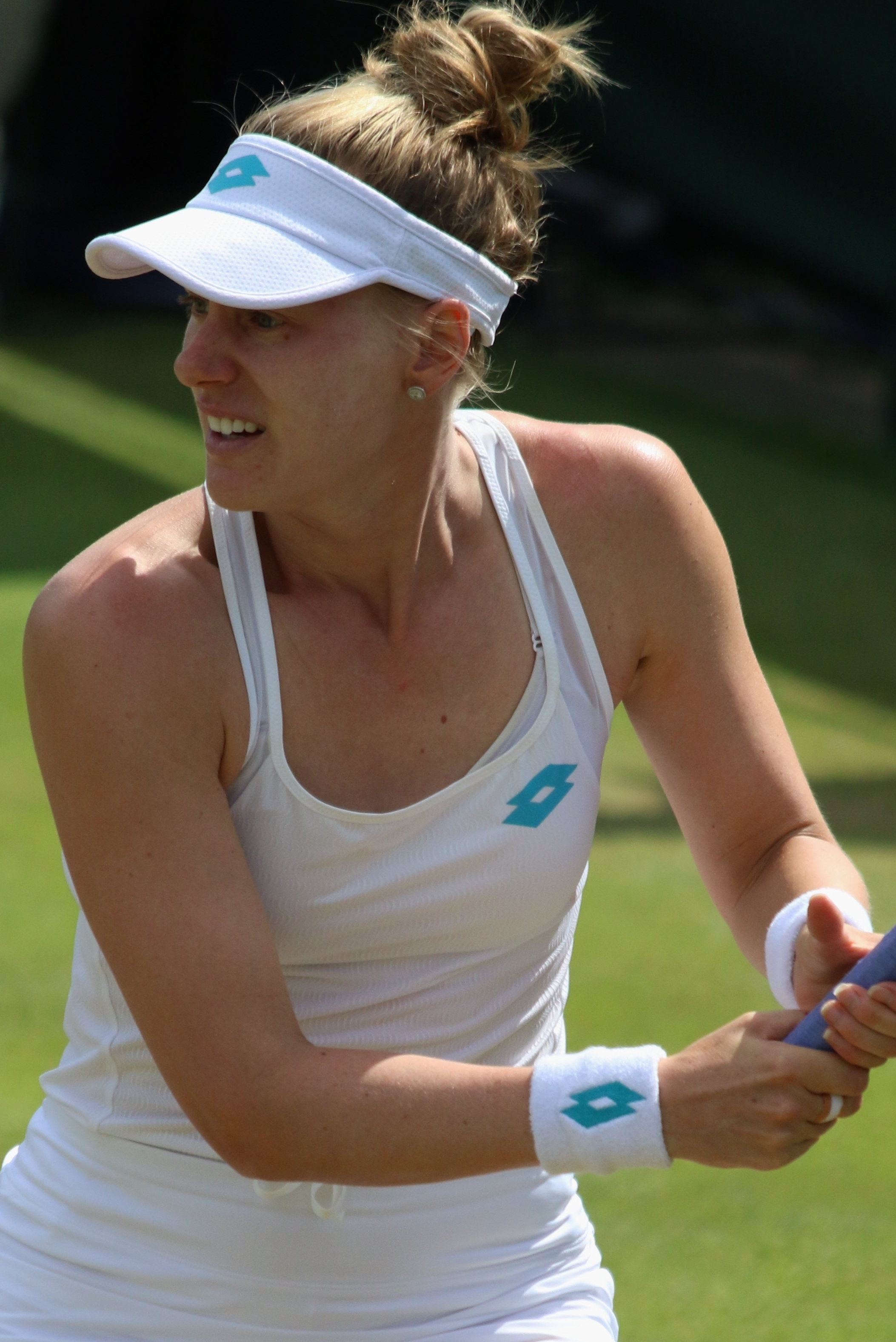 Riske WM19 (12)